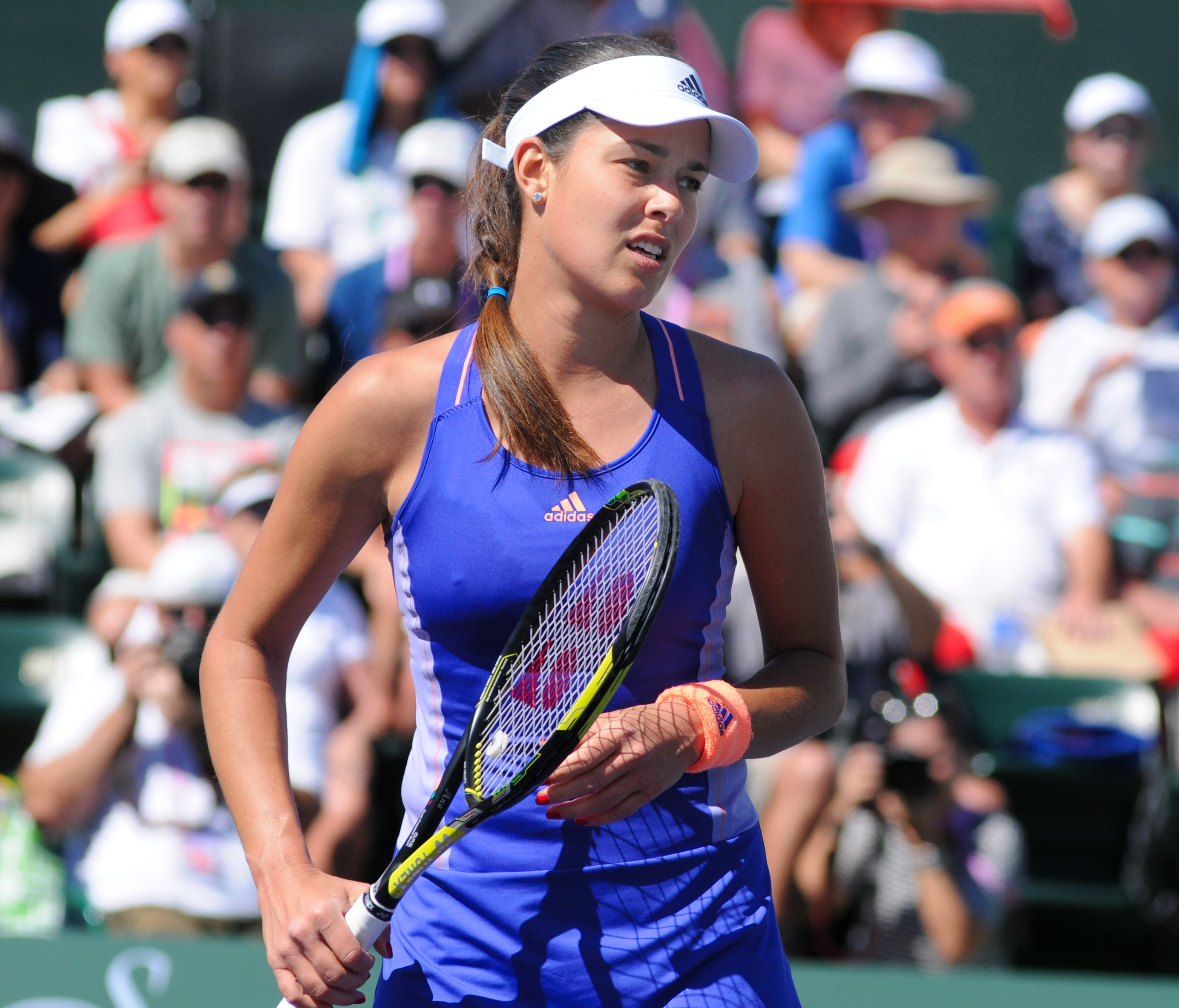 2015 BNP Paribas Open